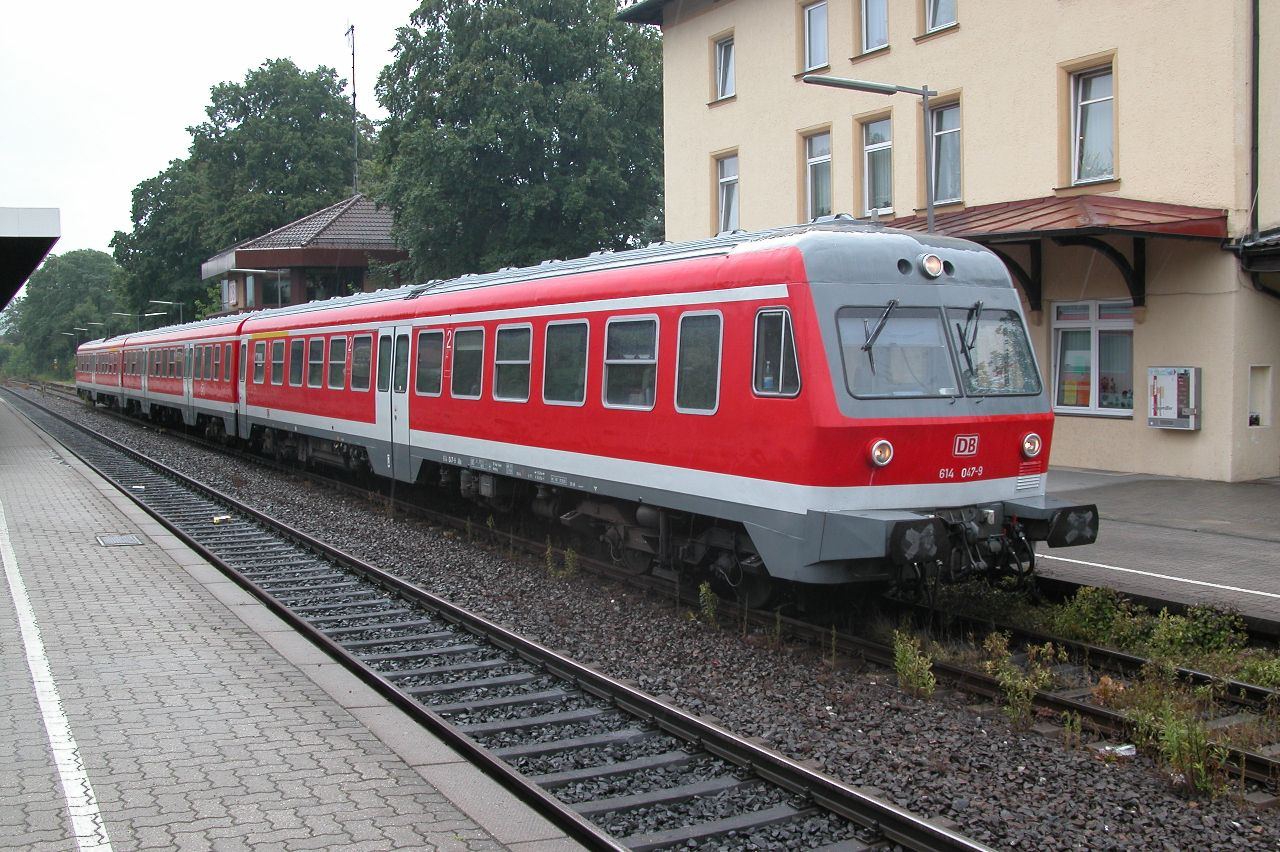 Beschreibung: 614 047-9 in Hersbruck Quelle: mef-presseservice